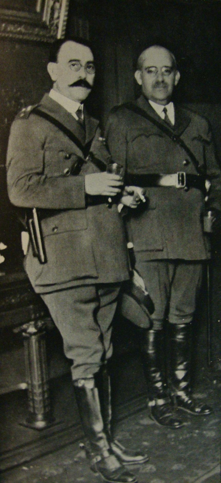 El presidente de facto de la Argentina, Teniente General José Félix Uriburu, dialoga con el General de División Agustín Pedro Justo en septiembre de 1930